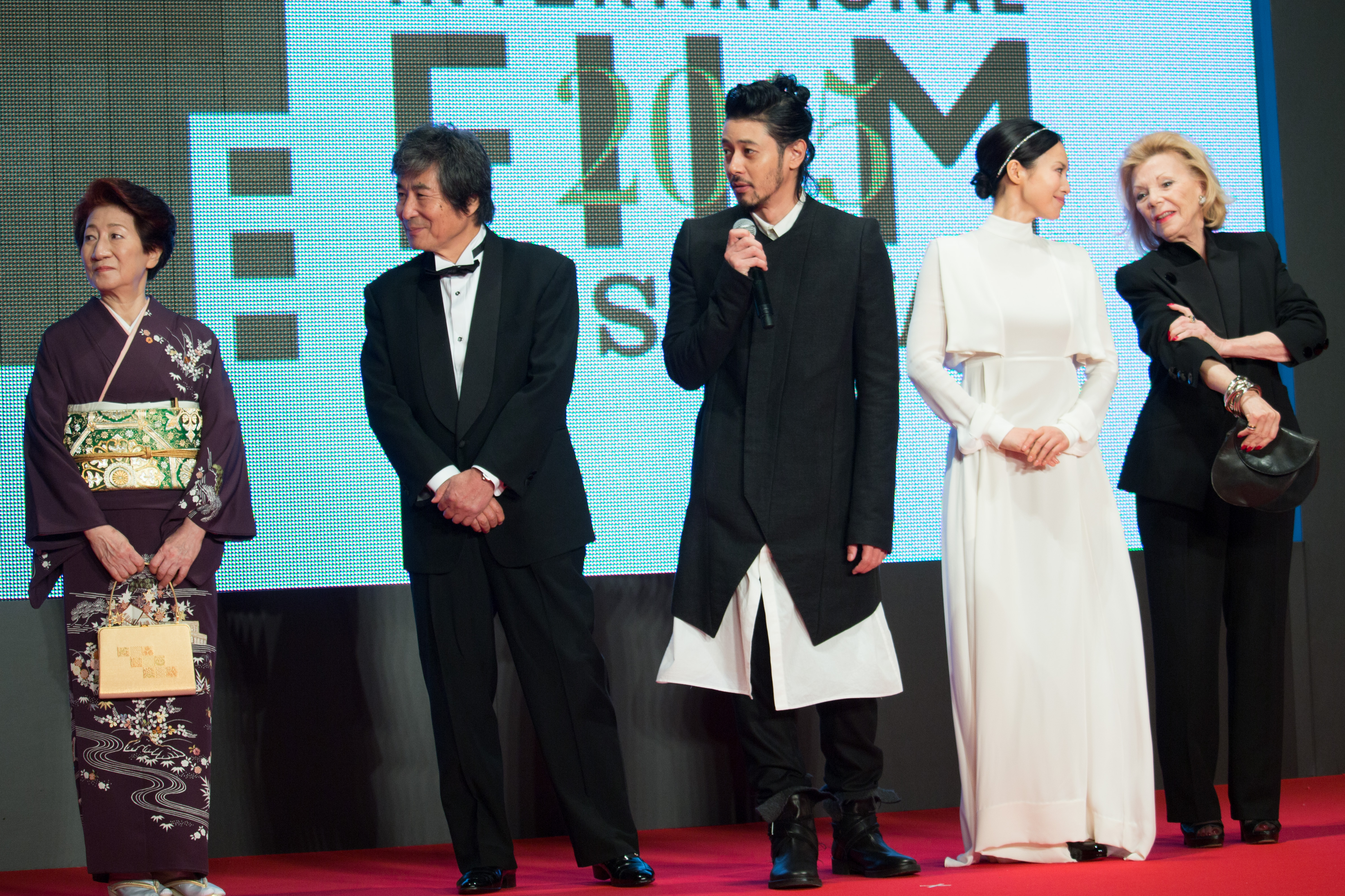 第28回 東京国際映画祭 オープニングセレモニー キャスト クルー (Foujita)